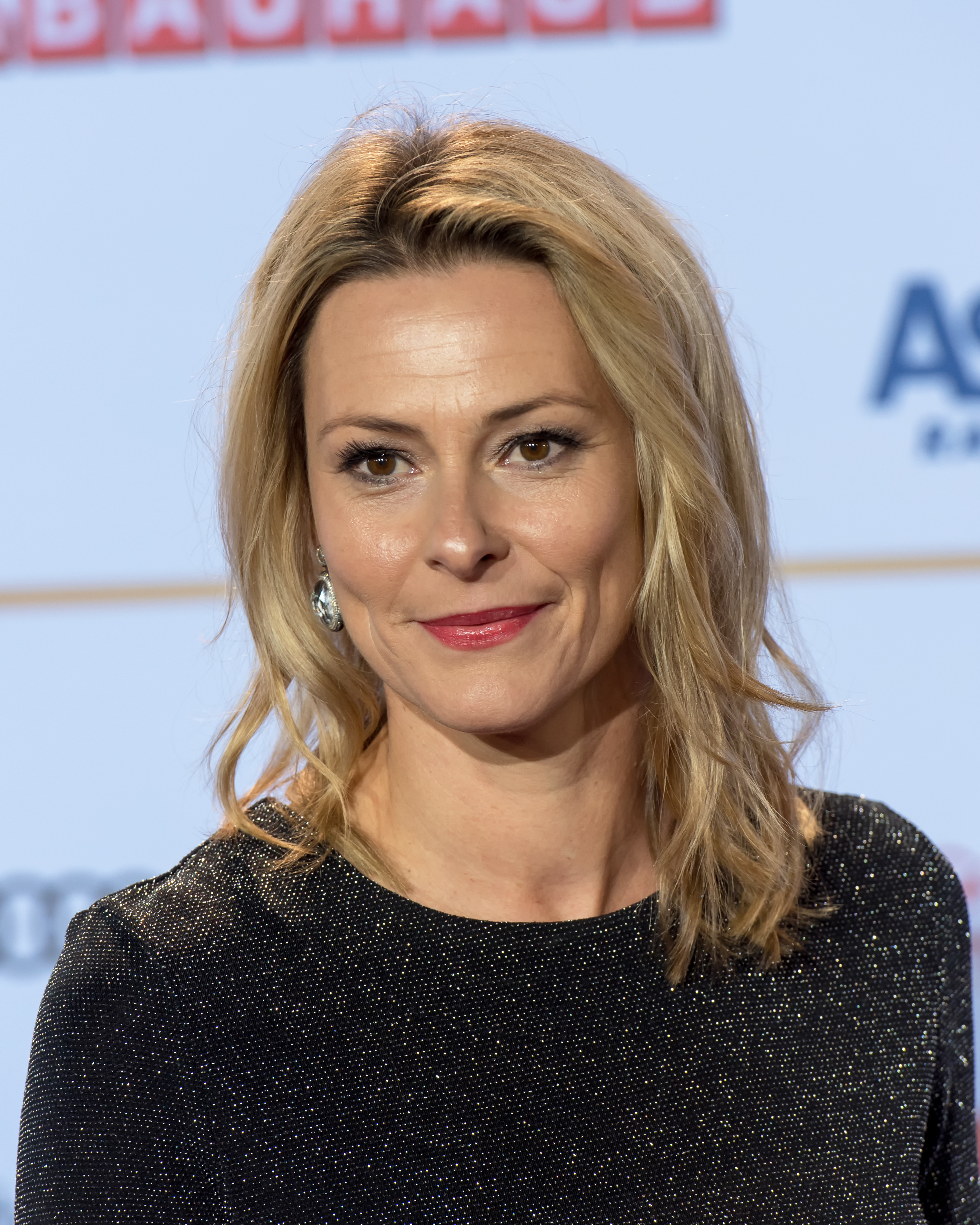 Anja Reschke beim Deutschen Radiopreis 2017 im Schuppen 52